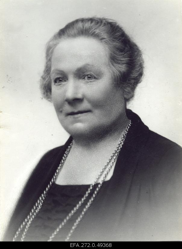 Naiskodukaitse esinaine Mari Raamot.